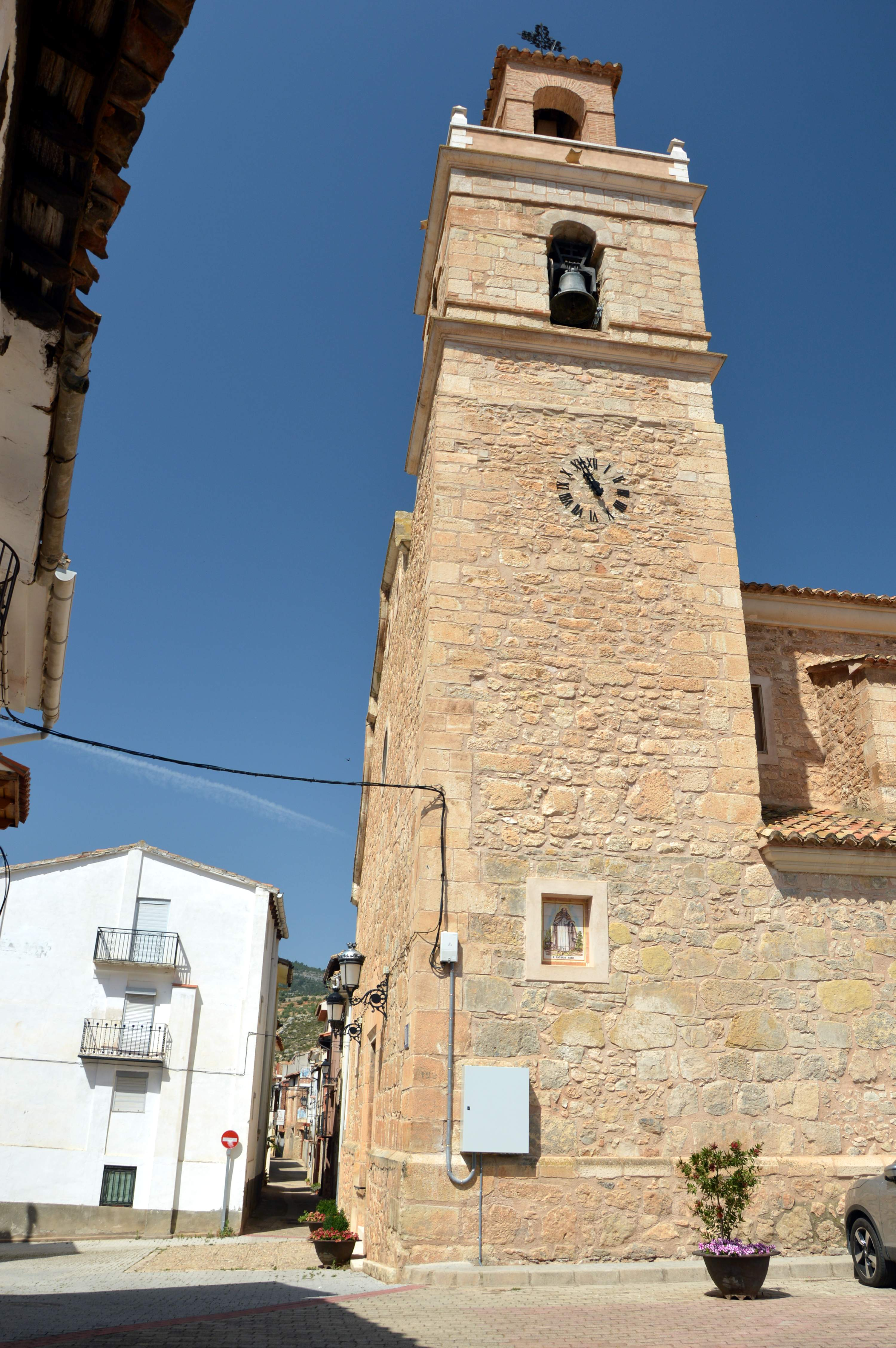 Vista general (septentrional) de la torre campanario de la parroquial de Casas Bajas (Valencia), 2018.